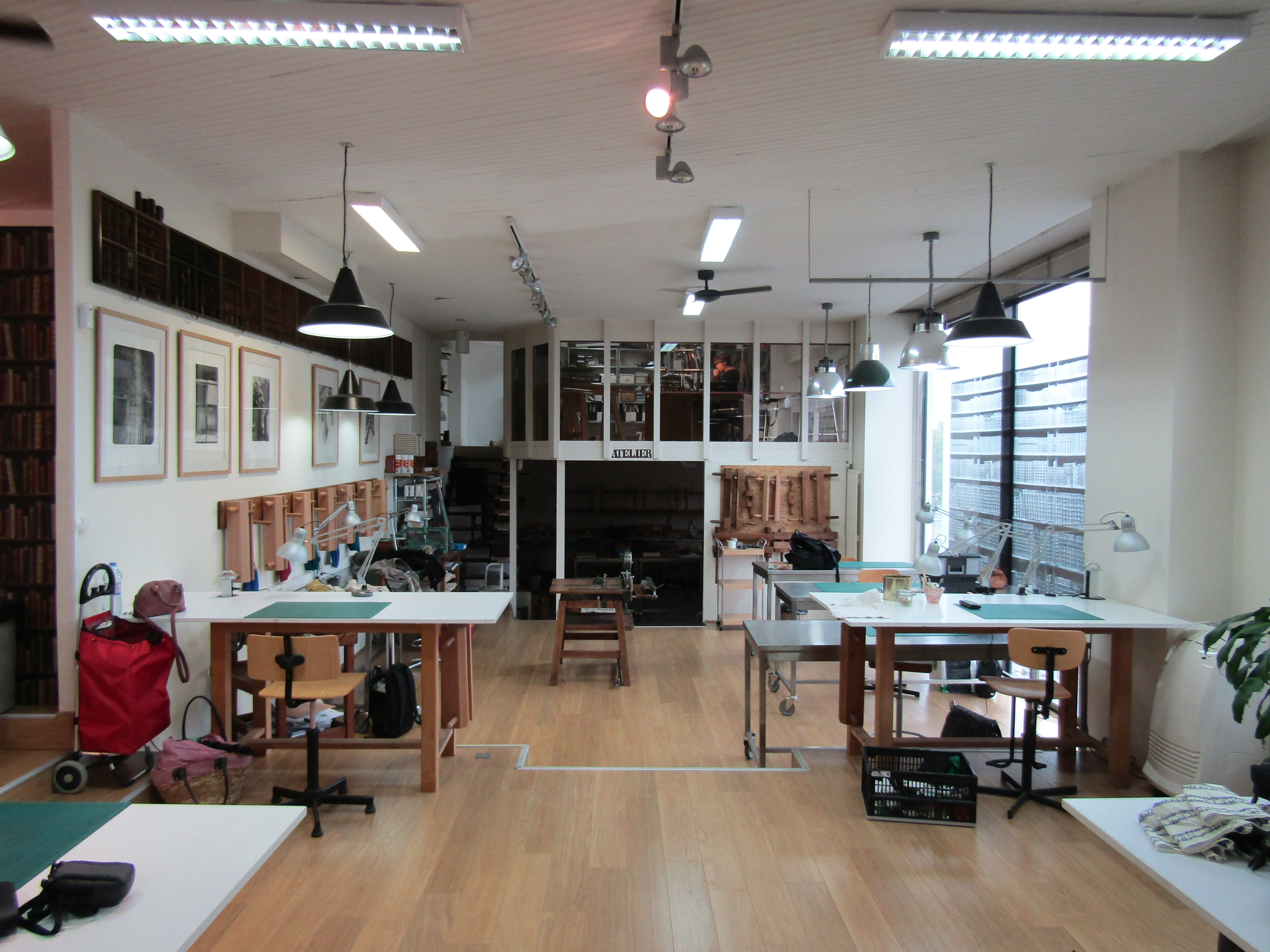 Centre de Formation et de Restauration du Patrimoine Ecrit, à Tours, Indre-et-Loire.